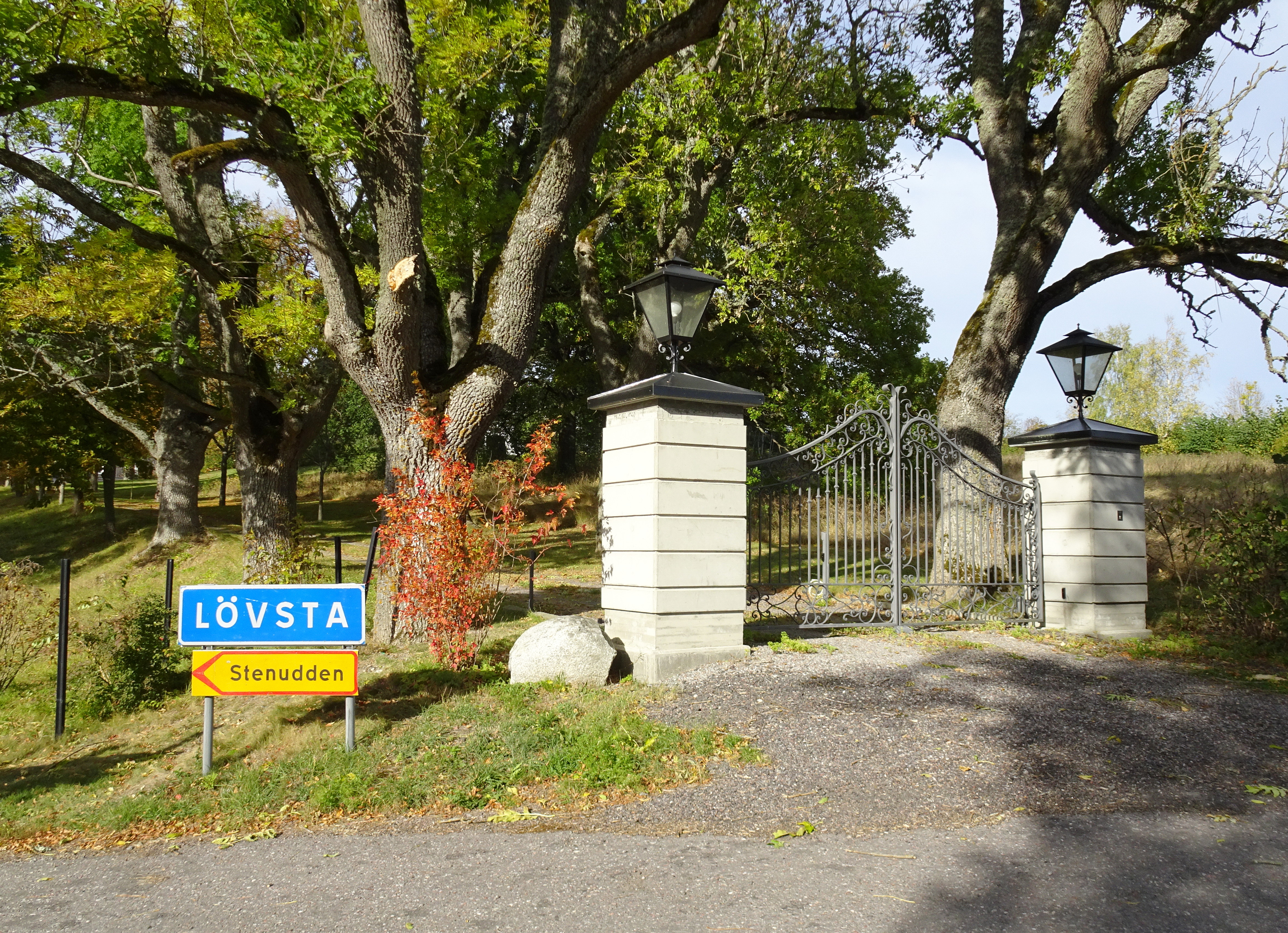 Lövsta gård, grind